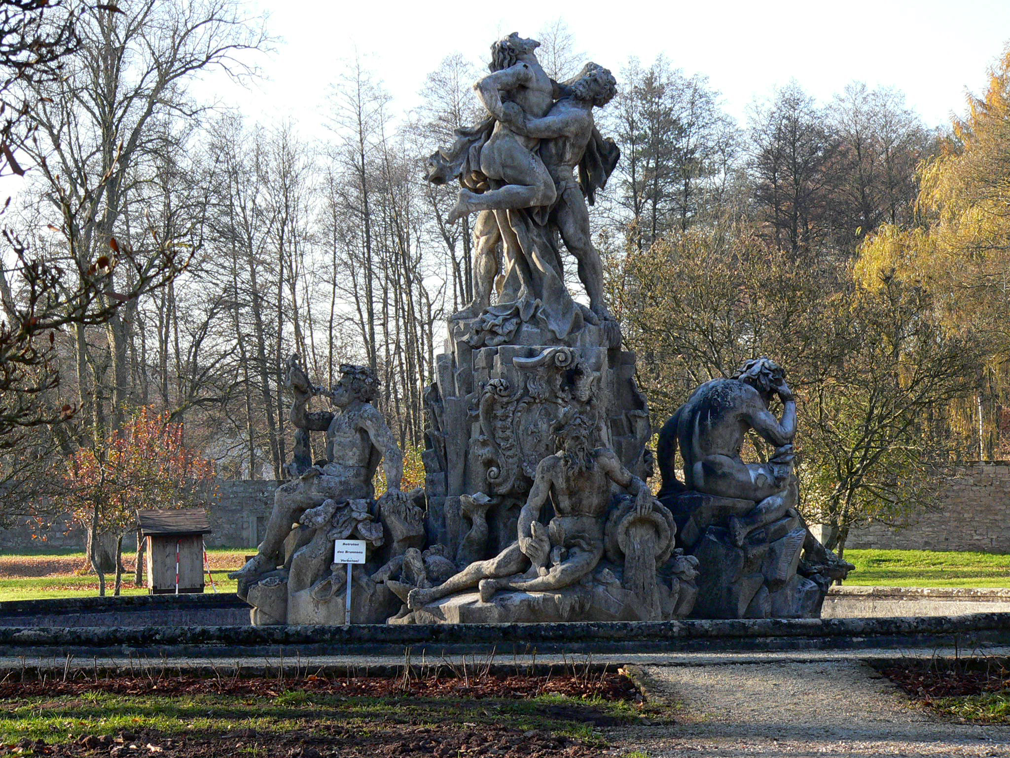 Kloster Ebrach: Herkulesbrunnen im Unteren Abteigarten